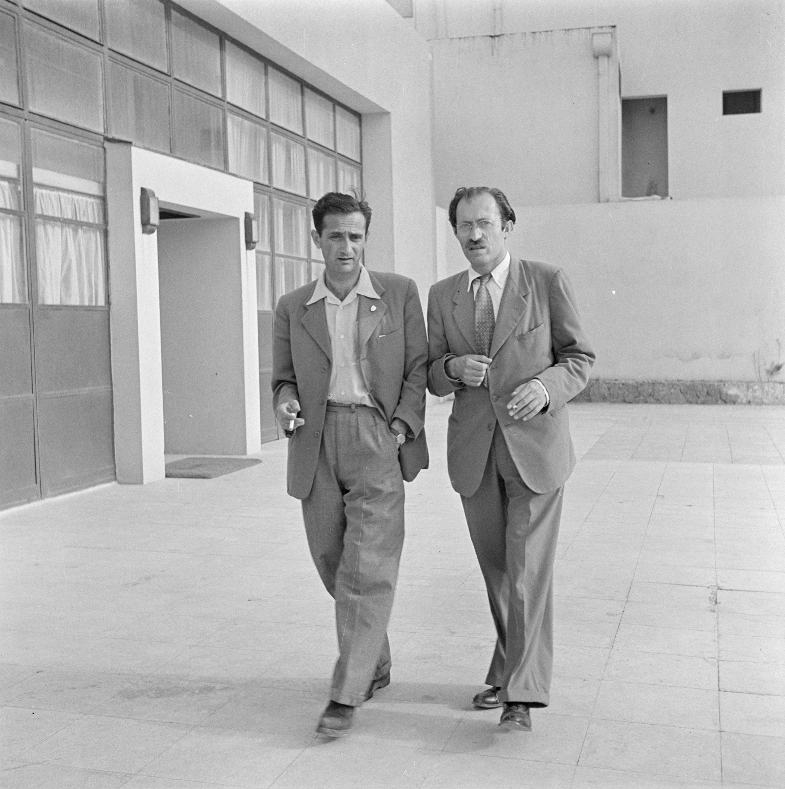 Collectie / Archief : Fotocollectie Van de Poll Reportage / Serie : Israel 1948-1949: Tel Aviv Beschrijving : "Etzel" Menachim Beigin, leider van de natinalistische Cheirouthpartij in in gesprek met een collega volksvertegenwoordiger in de wandelgangen van de knesseth in Tel Aviv Datum : 1949 Locatie : Israël, Tel Aviv Trefwoorden : gesprekken, parlementariërs, parlementsgebouwen, politici Persoonsnaam : Begin, Menachem Fotograaf : Poll, Willem van de Auteursrechthebbende : Nationaal Archief Materiaalsoort : Negatief (zwart/wit) Nummer archiefinventaris : bekijk toegang 2.24.14.02 Bestanddeelnummer : 255-1336